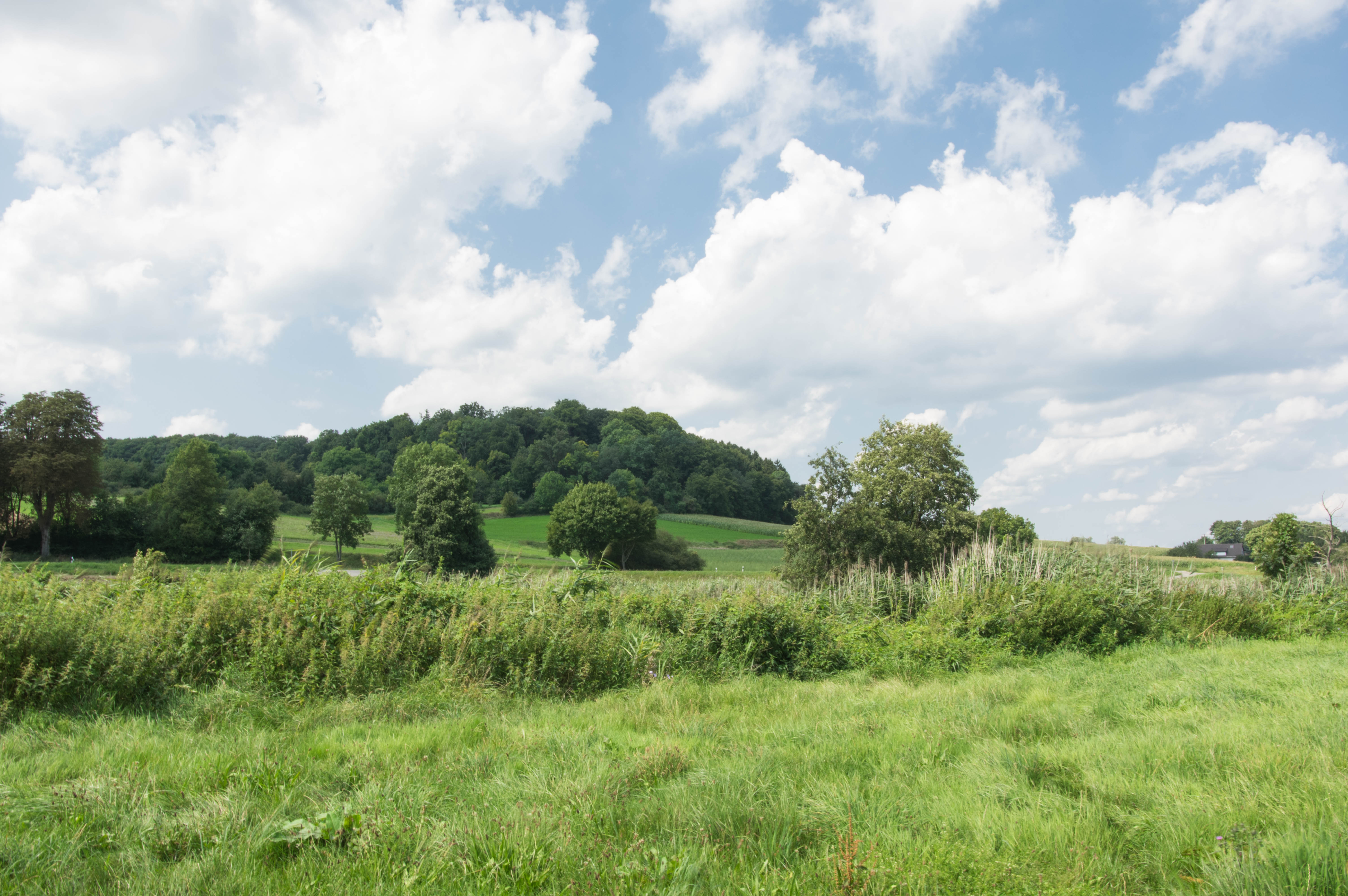 Blick nach E aus der Wörnitzschleife gegen den Hainsfarther Kirchenberg, Landschaftsschutzgebiet LSG-00250.01